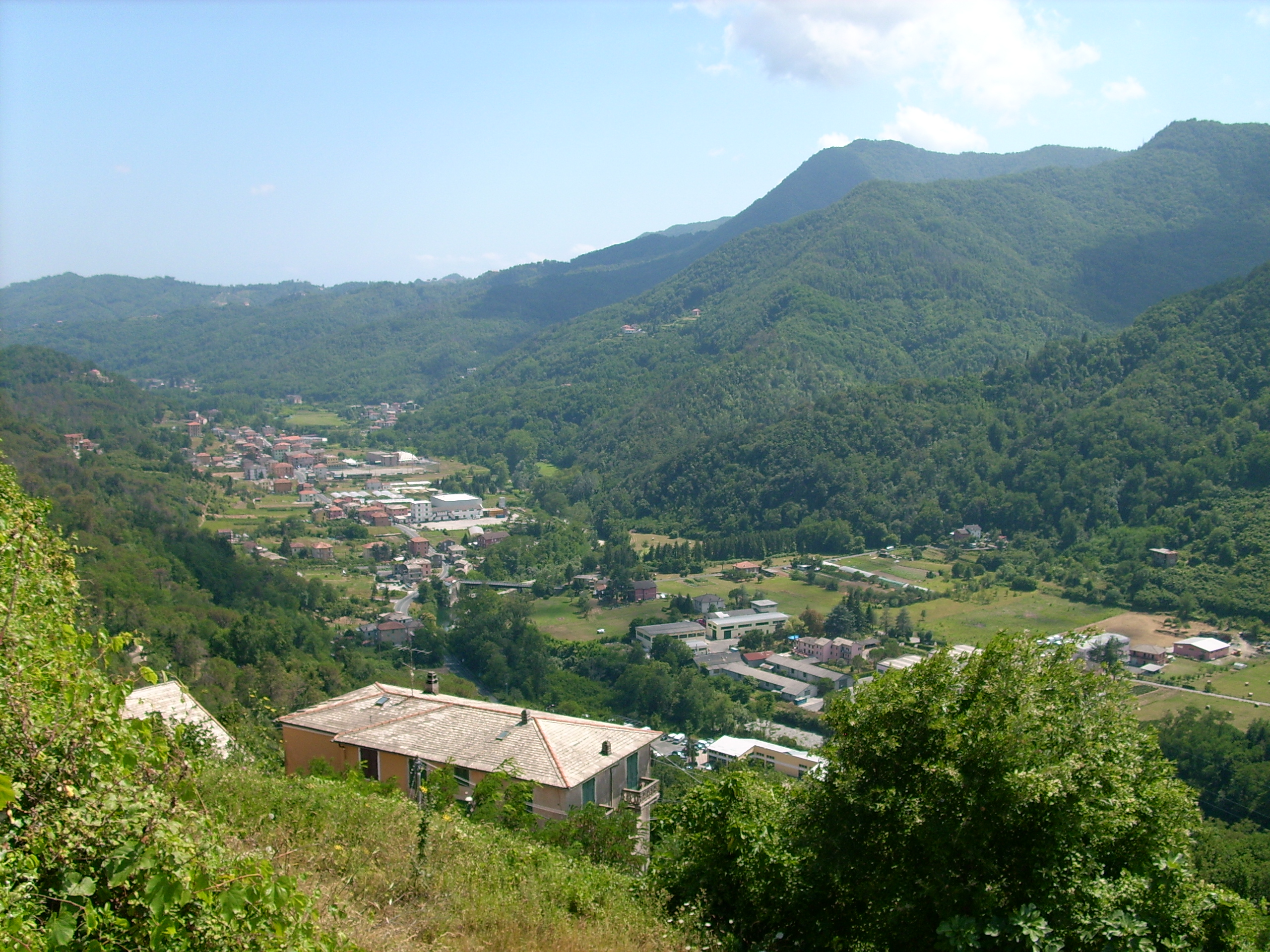 San Colombano Certenoli, Liguria, Italia